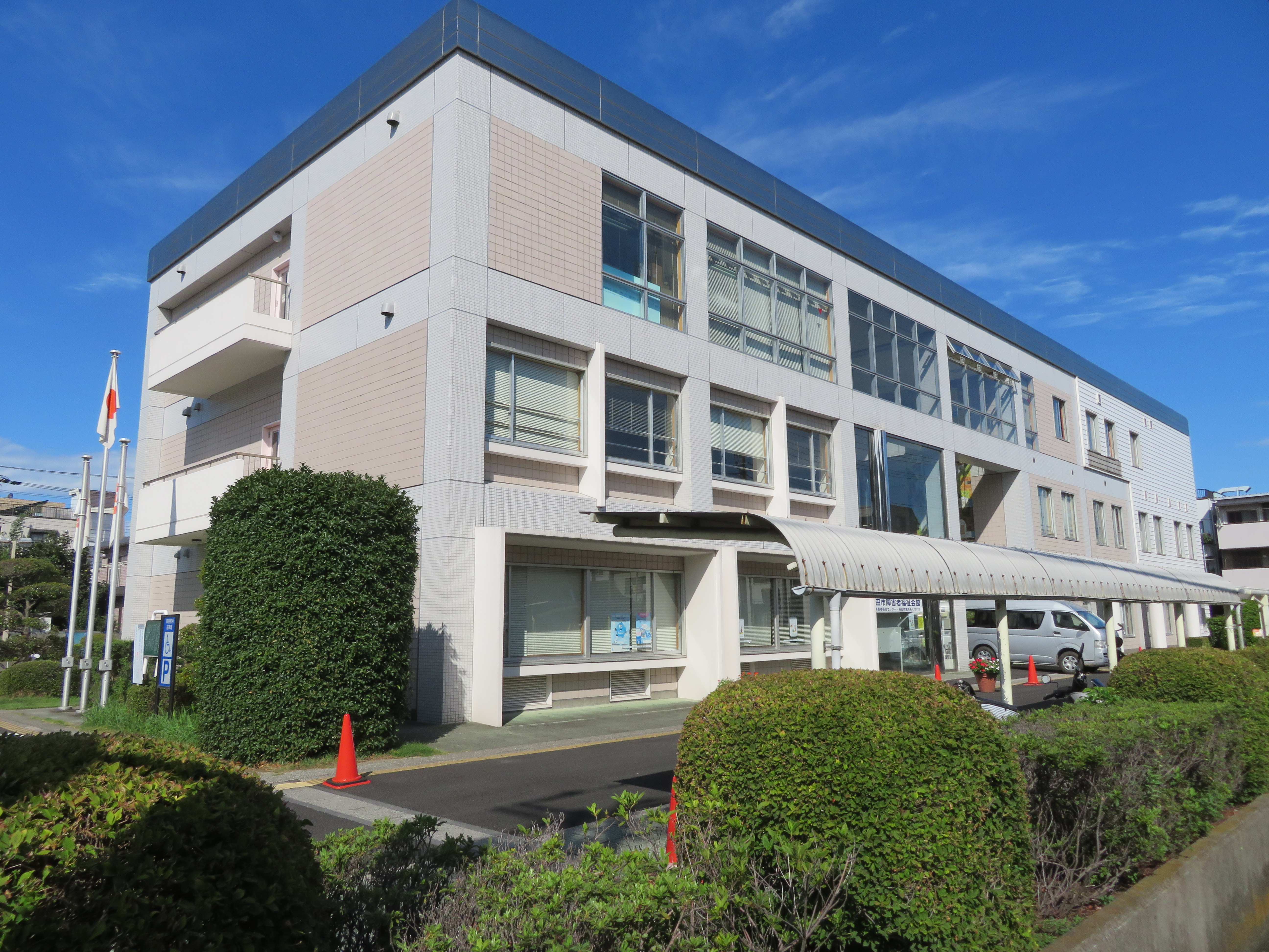 埼玉県戸田市に所在する福祉青少年会館 Canon PowerShot SX720 HS